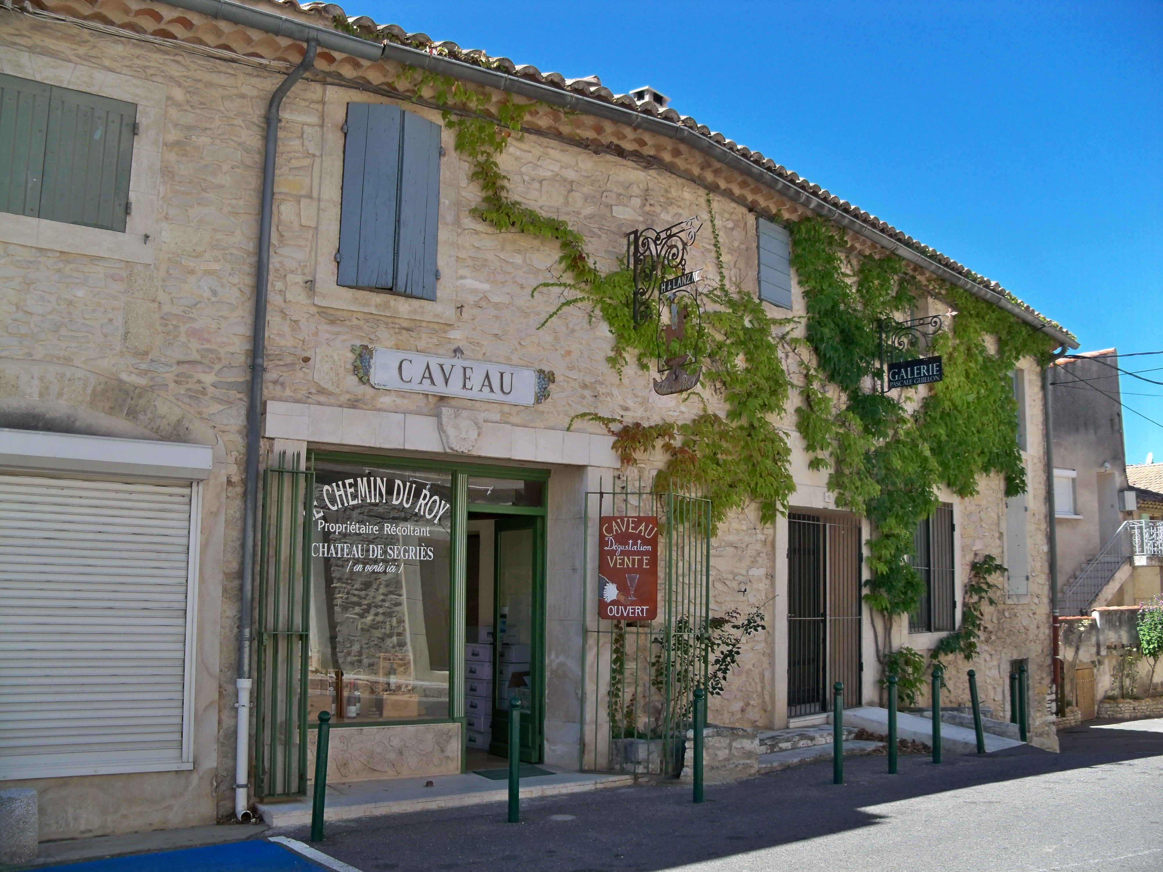 Caveau Chemin du Roy à Tavel (Gard)